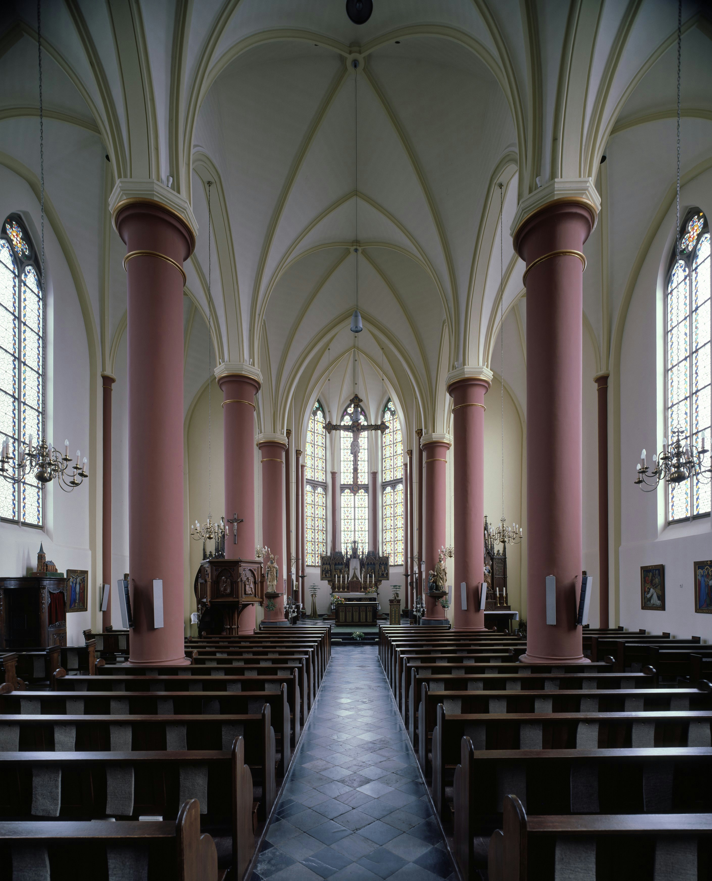 Sint Martinuskerk: Interieur, overzicht naar het oosten (koor)